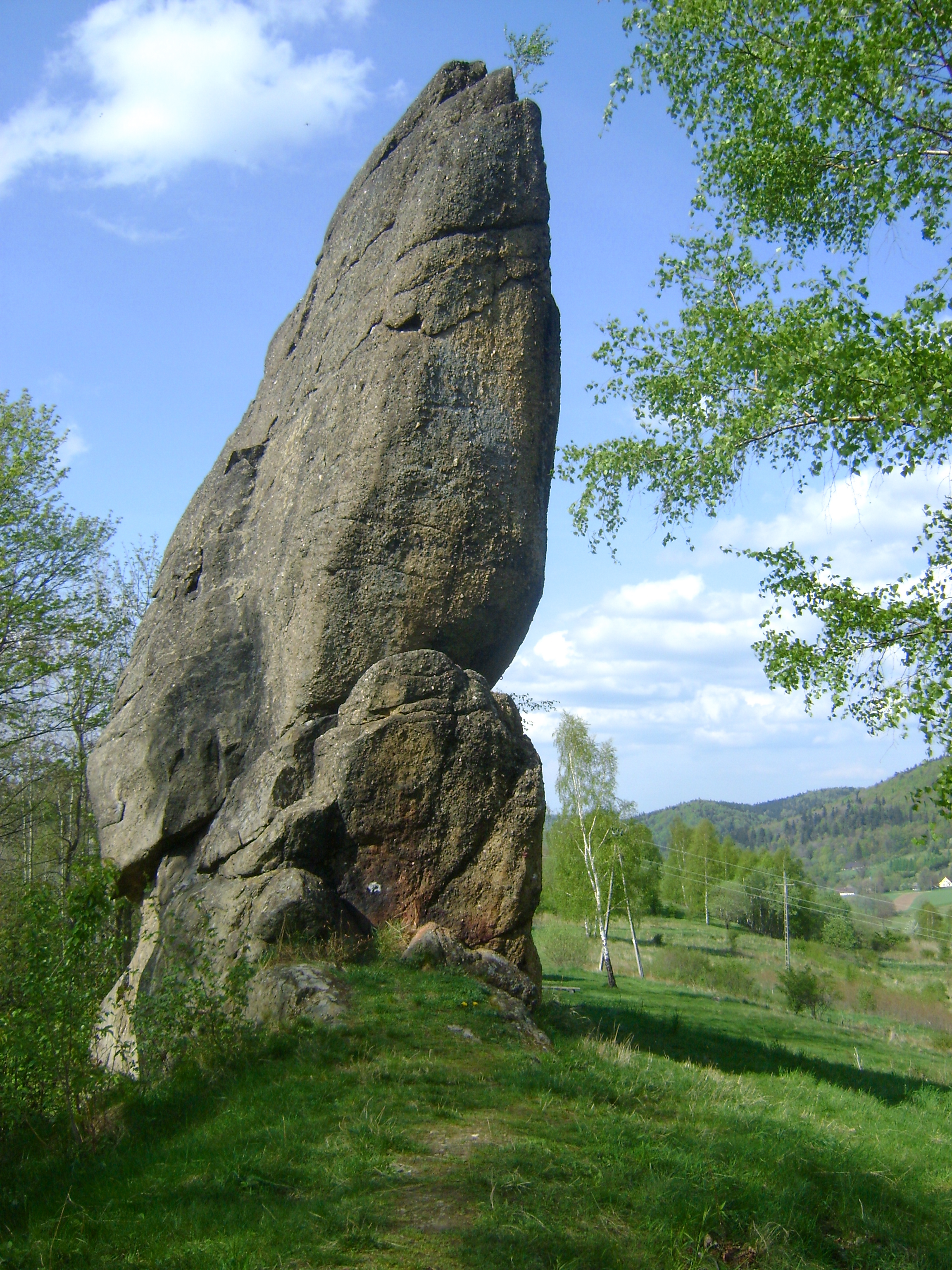 Skała z grupy malowniczych skał na Wysoczyźnie Idzikowa w południowo-zachodniej Polsce w Sudetach Środkowych, w województwie dolnośląskim, powiecie kłodzkim. Widok na skały od strony północnej.